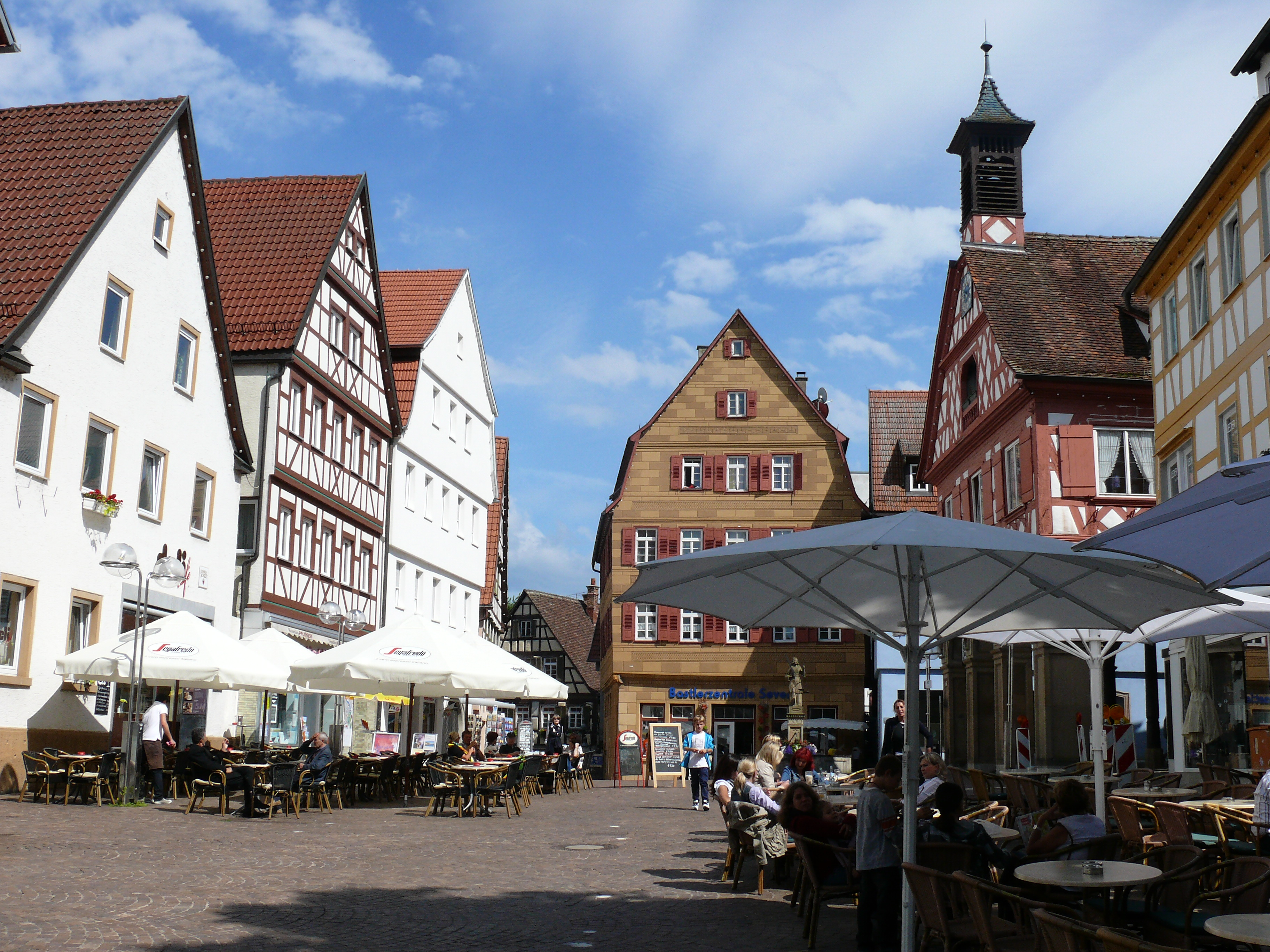 Der Marktplatz in Waiblingen im Rems-Murr-Kreis. Ostseite.